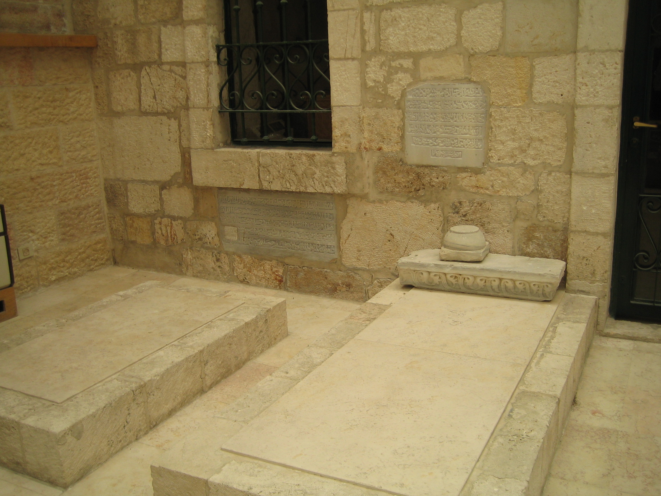 Tumba del político palestino y escritor Ruhi Khalidi en la Biblioteca Khalidia de Jerusalem